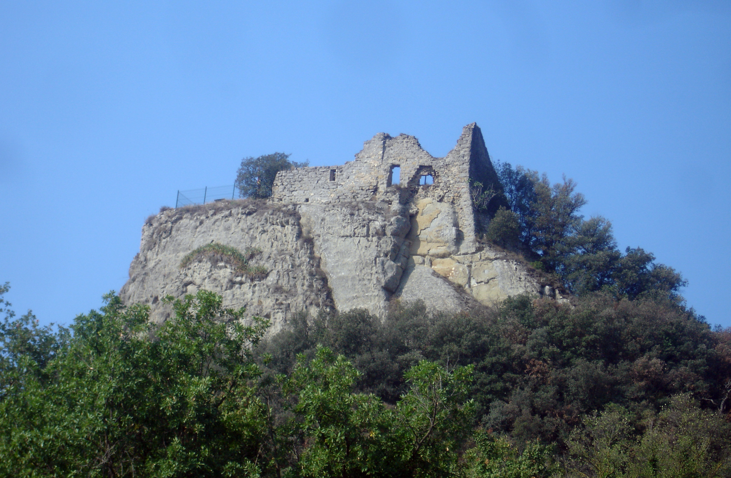 Castell d'Orís (Vic, Osona, Catalunya, Espanya)